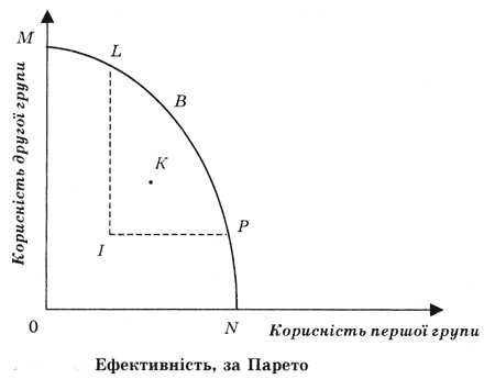 Графік ефективності за Парето